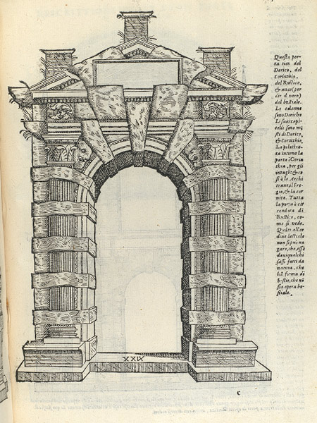 Tavola XXIX del Libro Extraordinario di Sebastiano Serlio (1551)